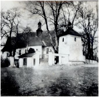 Kościół w Modlnicy lata 20-te XXw